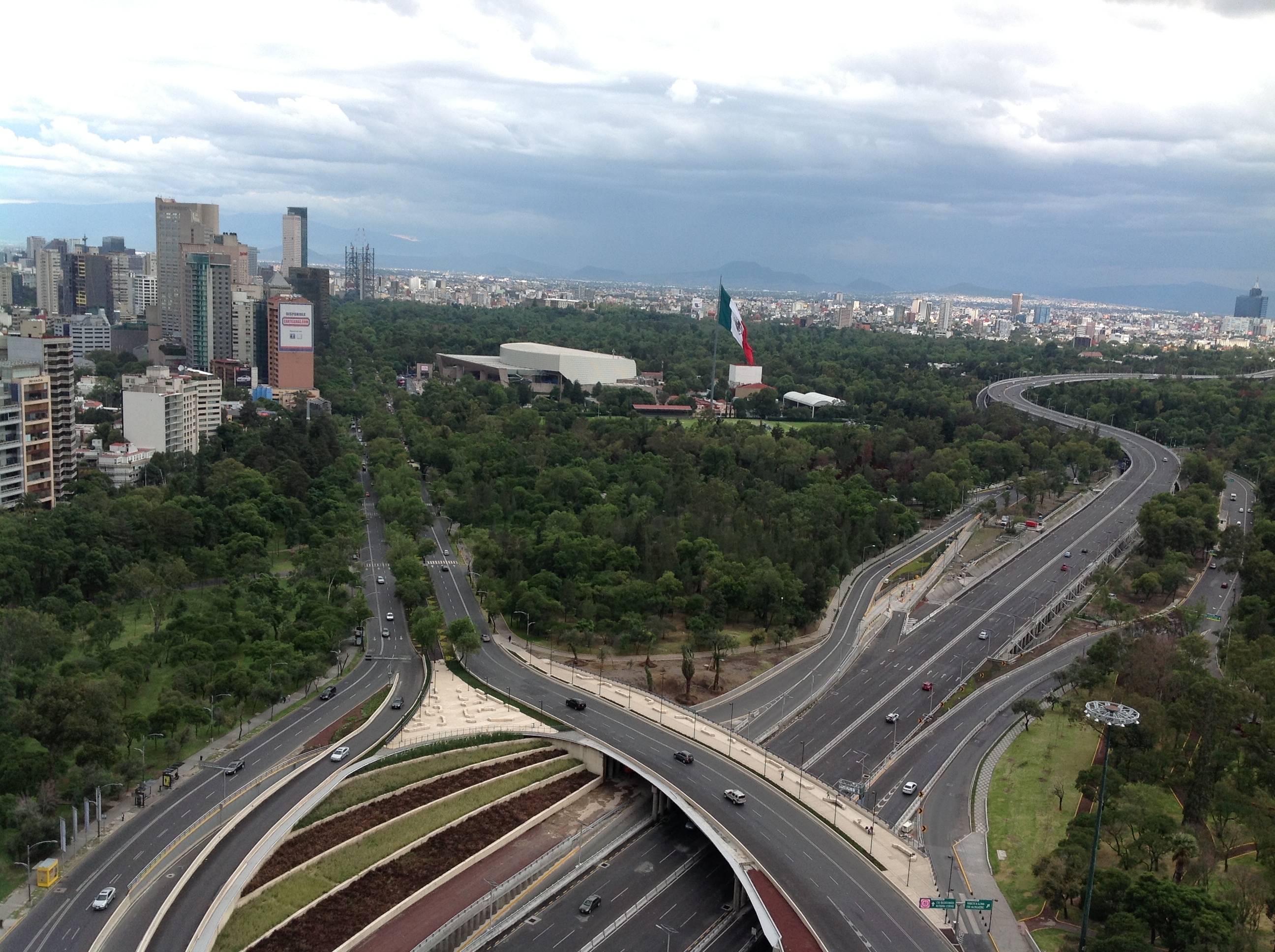 Pequeña foto panoramica de la Ciudad de México desde Periferico y Paseo de la Reforma